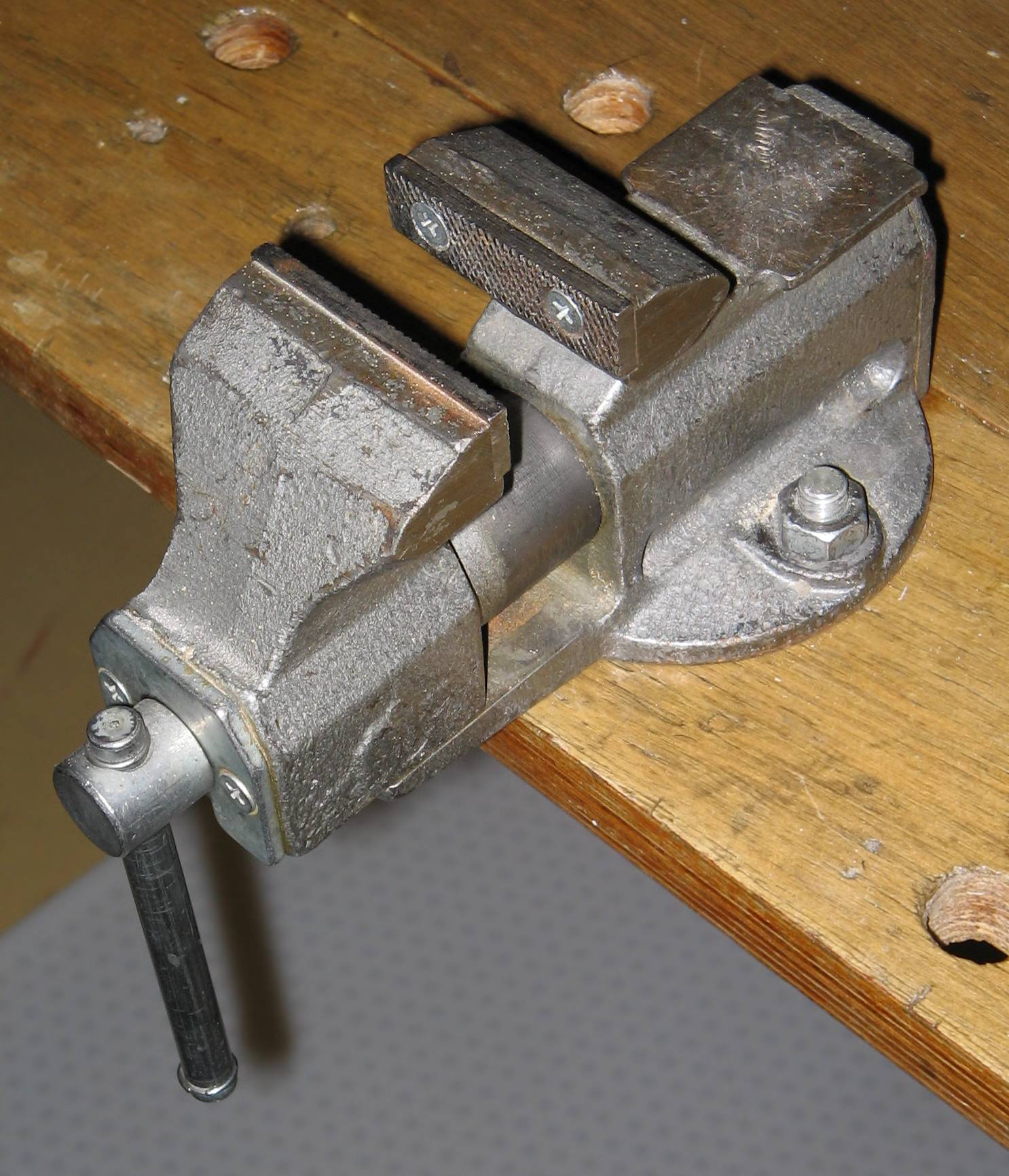 Serurista vajco. La foto estis farita de mi mem.